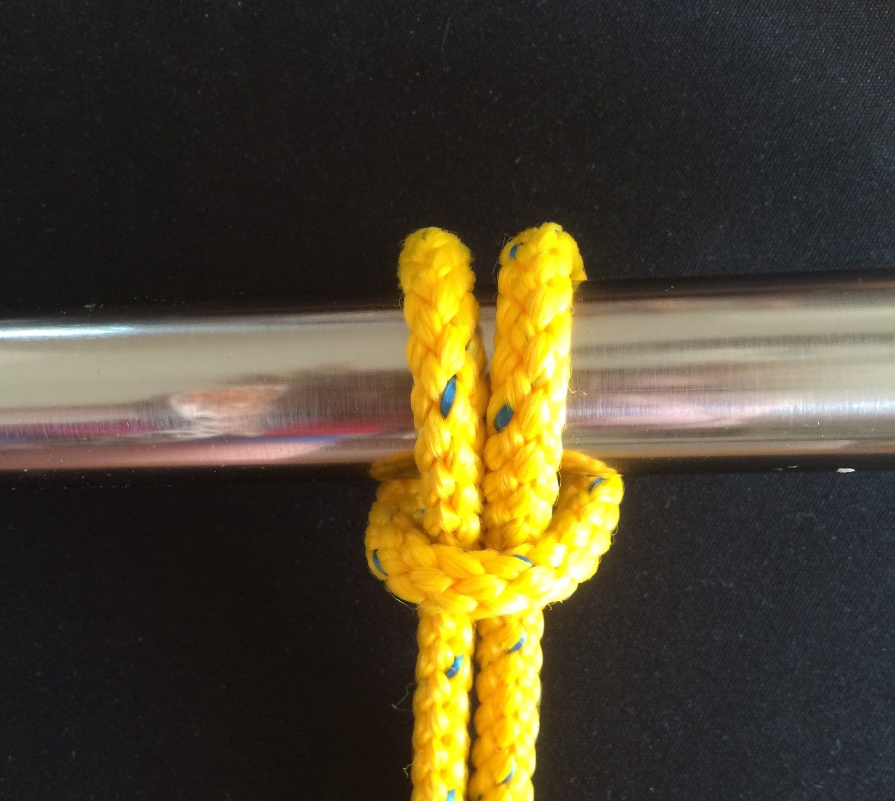 Lärkhuvud